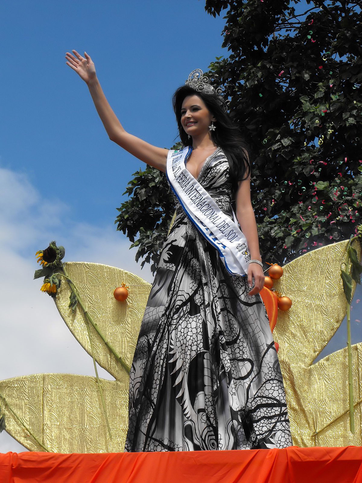 MeridaItalia, noi MeridaItalia, rilasciamo a Wikimedia Italia, l'immaggine in questione sotto licenza cc-by-sa. l'Immagine raffigura la Reina o Novia del Sol 2009. dissintinti salutti --MeridaItalia (msg) 17:55, 15 giu 2010 (CEST)